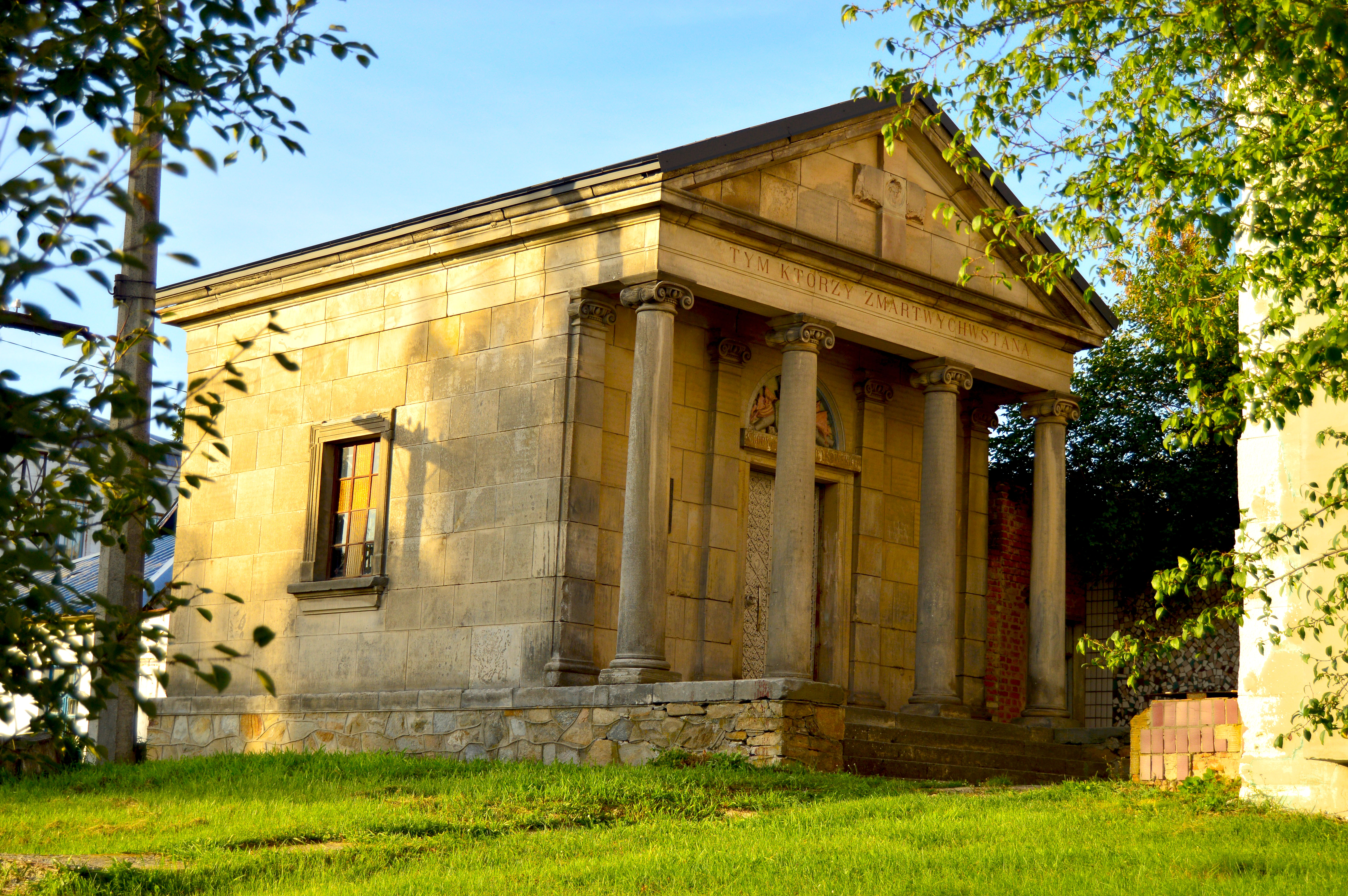 Каплиця Внебовзяття Пресвятої Діви Марії (Каплиця Свейковських) (пол. Kaplica Swieykowskich) — пам'ятка архітектури національного значення початку XIX століття в місті Тетієві на Київщині. Усипальниця родини Свейковських. Каплиця — входила до комплексу тетіївського костьолу святого Яна Непомука, змурованого у 20-х роках XIX століття на місці давнього дерев'яного (загалом у різних джерелах подані дати від 1802 року до 1820-х років). У радянські часи костел було перебудовано на цех, а каплиця служила складом заводу «Електронмаш». 11 березня 2006 року пам'ятку повернено місцевій римо-католицькій громаді. Силами ентузіастів проведено ремонт. Сама будівля костелу досі знаходиться на території вже недіючого підприємства, поряд із каплицею, як одна з виробничих будівель. У каплиці діє парафія Успіння Пресвятої Діви Марії